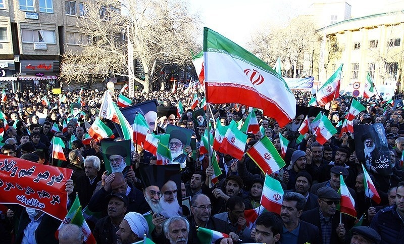 Pro-establishment rallies in Hamedan